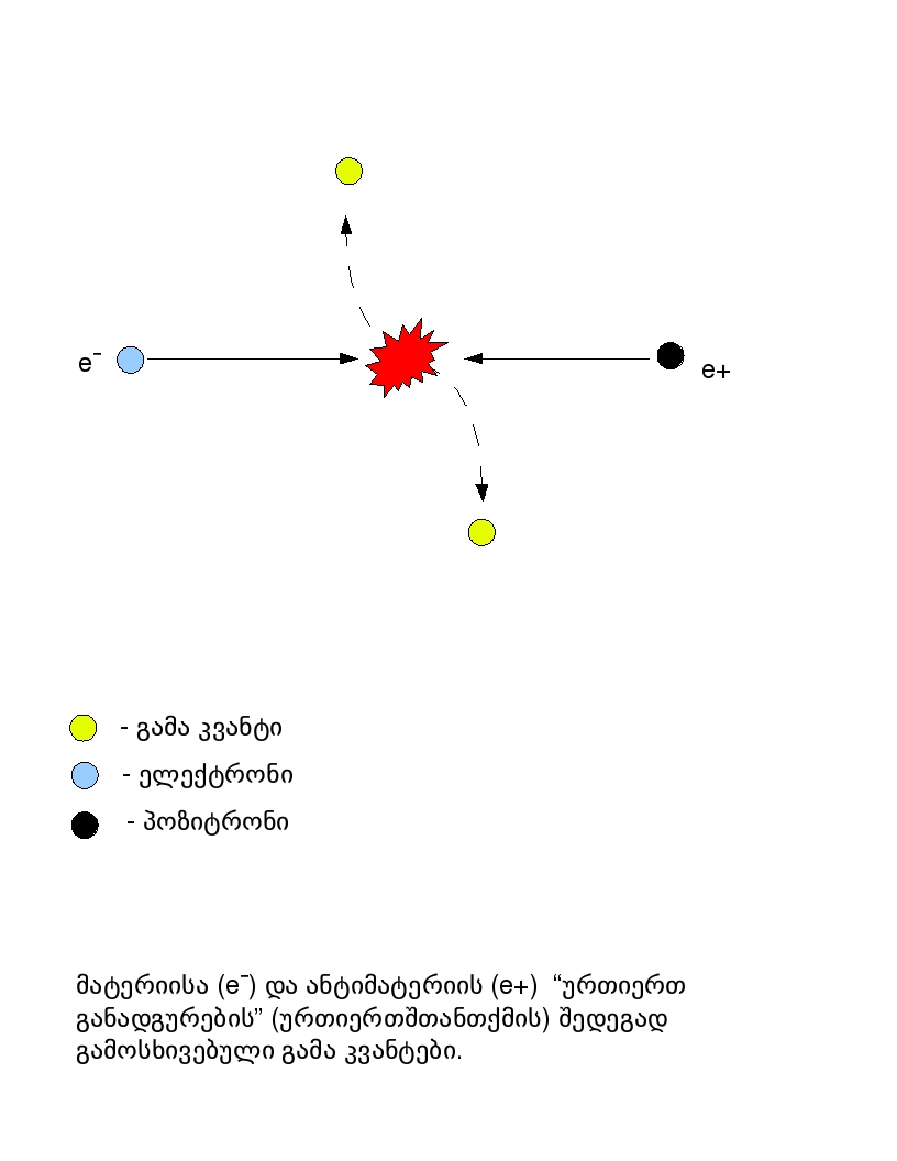 elektron-antielektron vernichtung (Physik)